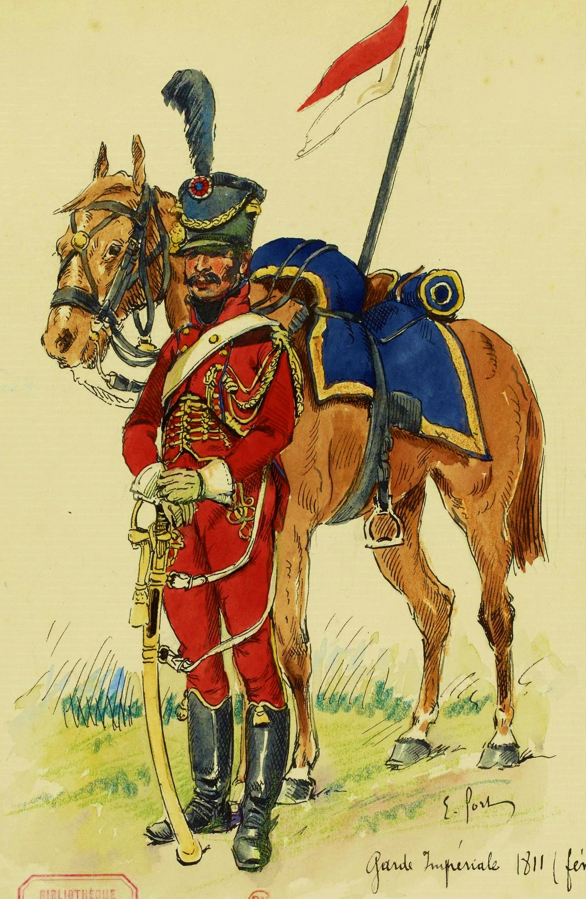 Lancier rouge de la Garde impériale, 1810-1811. Il porte en grande partie la tenue de l'ex-régiment de hussards de la Garde royale hollandaise.